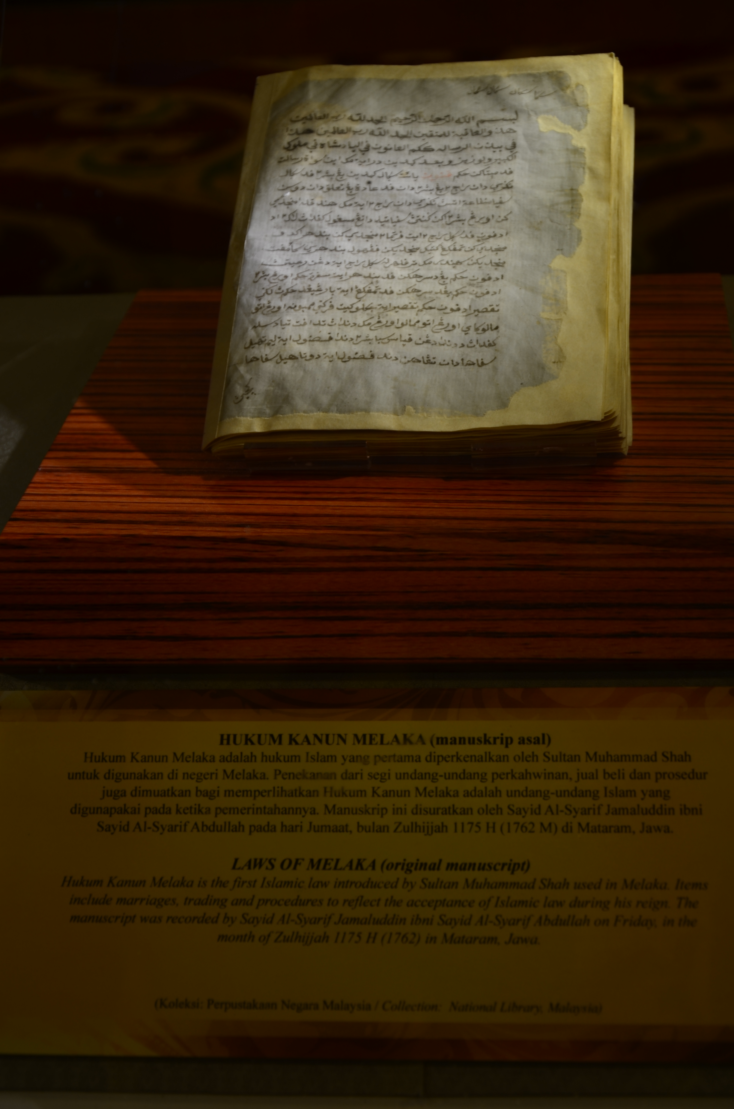 Hukum Kanun Melaka (manuskrip asal) bersama keterangan. Dipamerkan di Balairong Seri, Istana Negara Lama, Jalan Istana, 50566 Kuala Lumpur.